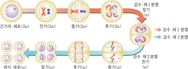 감수분열은 제 1감수분열과 제 2감수분열로 나뉘는데, 이 두 분열이 끝나면 유전에 적합한 합플로이드, 반수체 상태로 된다.